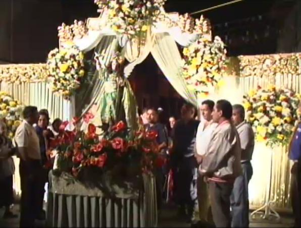 Descanso de San Miguel en un Arco durante la Octava